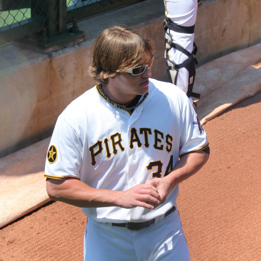 Daniel McCutchen